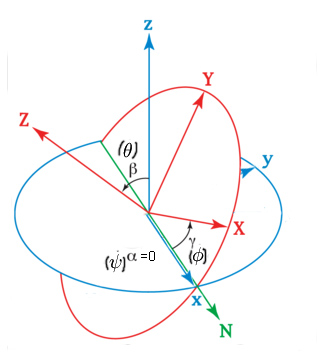 Angulos de Euler particularizados para el caso de FI=0